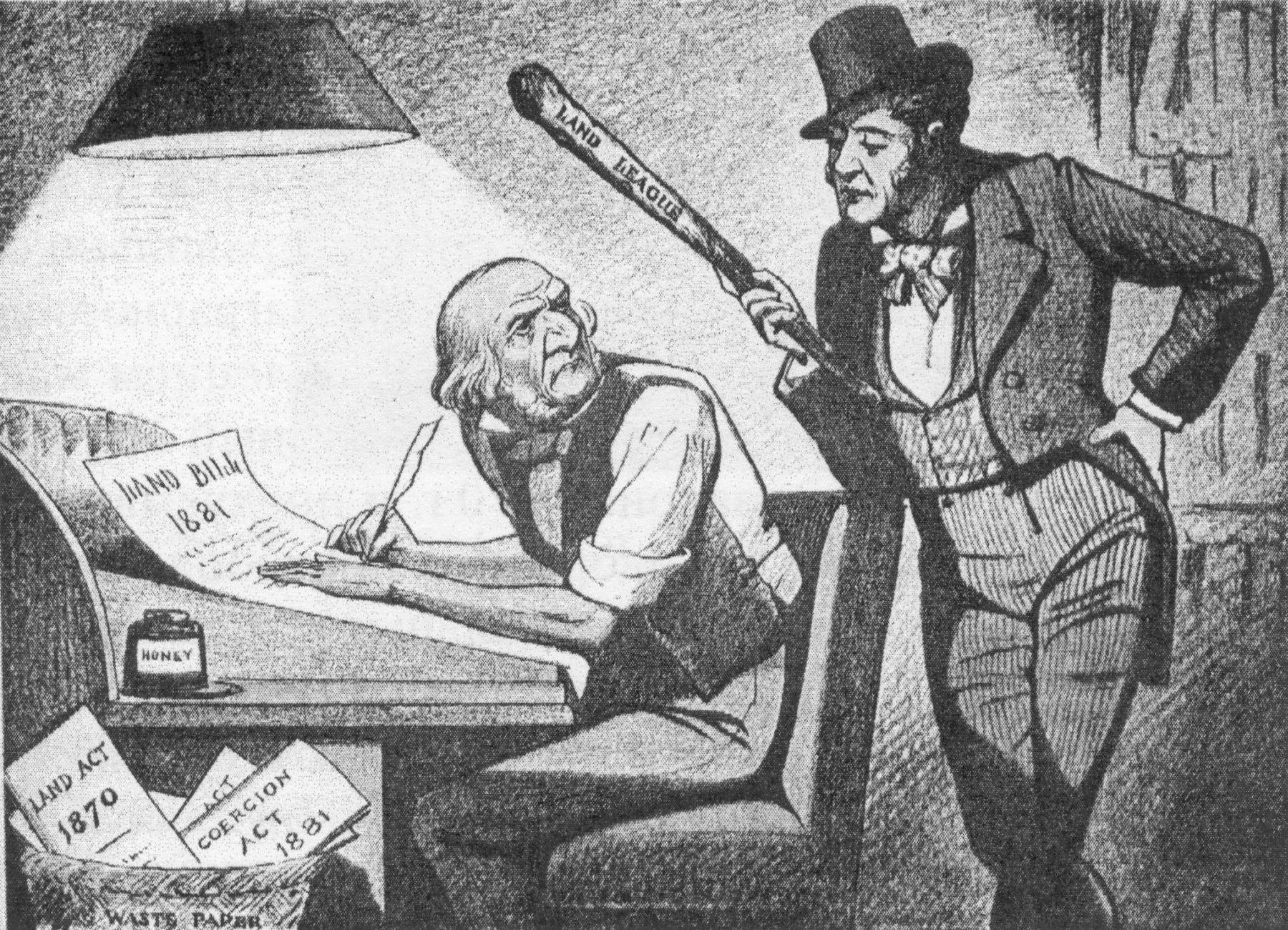 Гладстон под влиянием Земельной Лиги. Карикатура 1880-х годов.